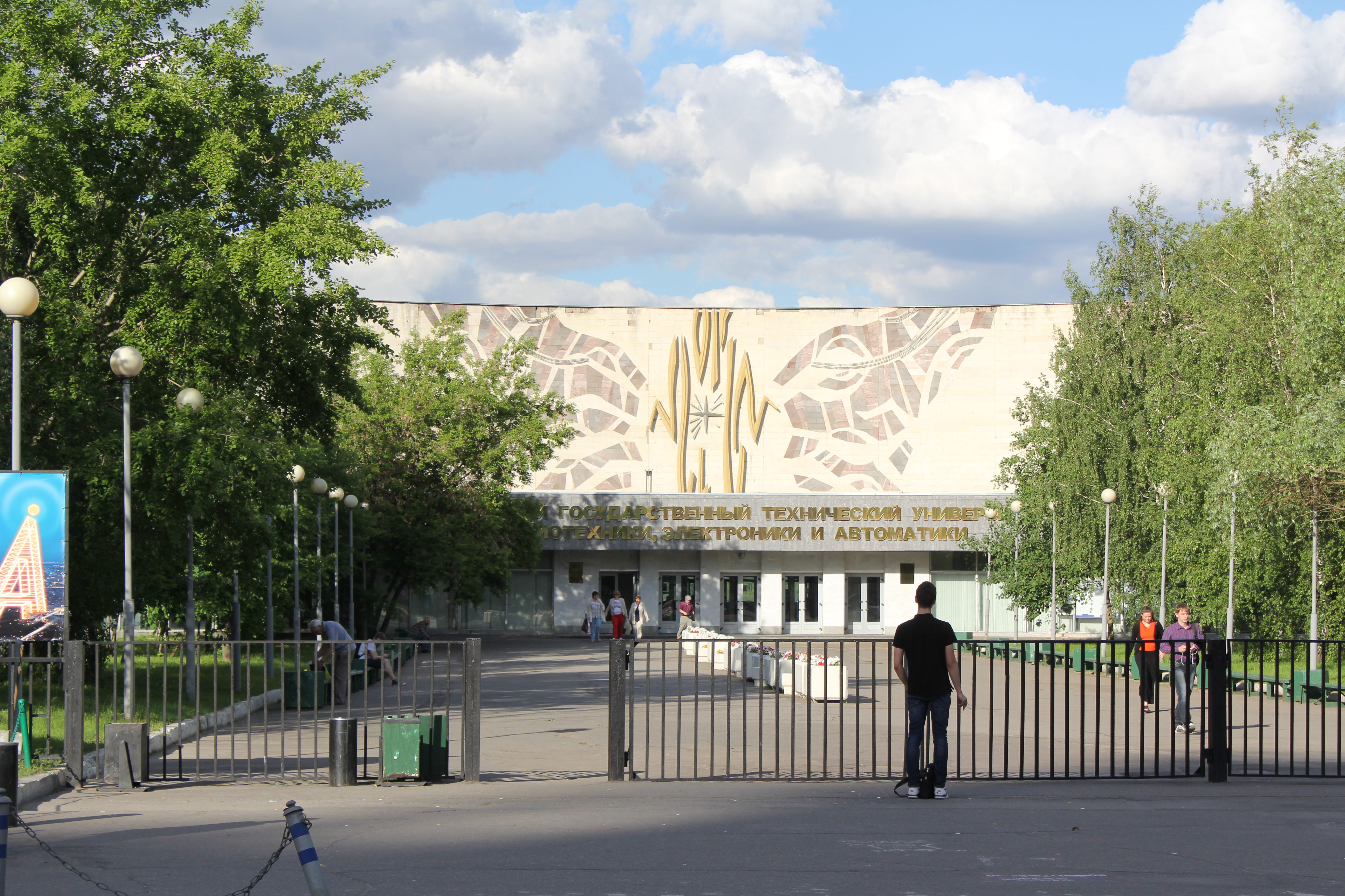 Корпус МИРЭА